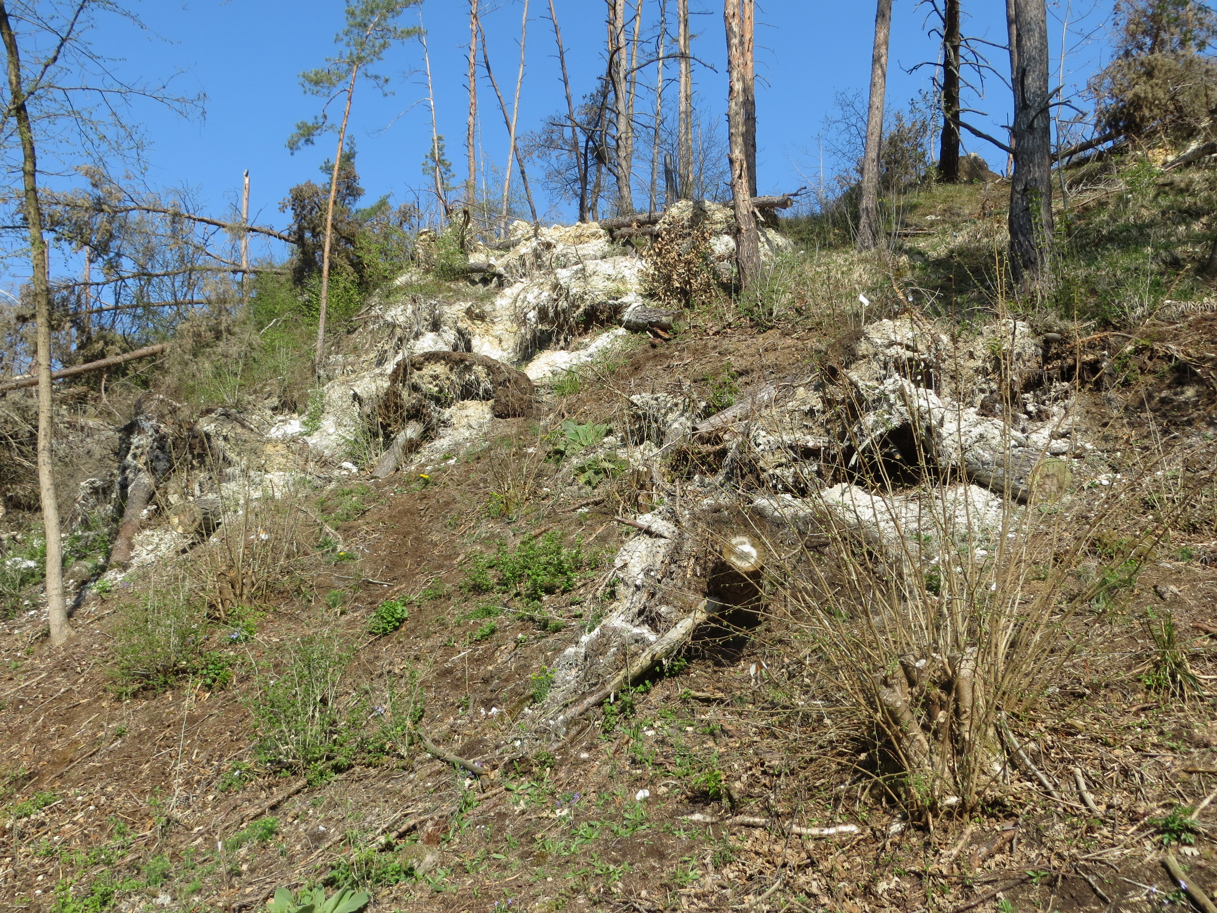 Gipskarst am Weg zur Osterkippe